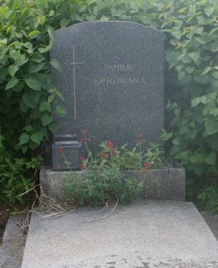 Wiener Südwestfriedhof-Leopold Sprowacker